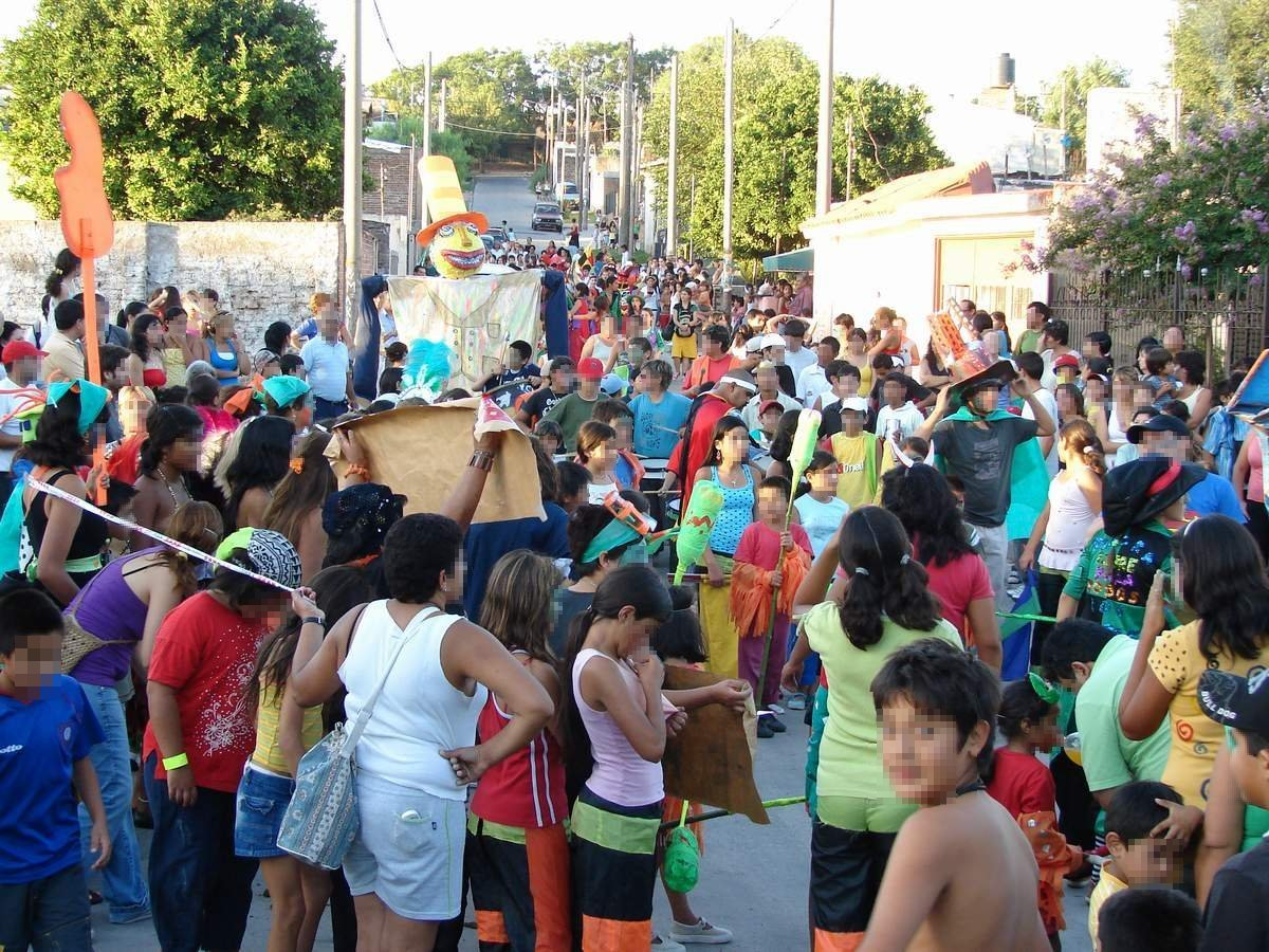 Carnavales en el barrio de Bella Vista, Ciudad de Córdoba, Argentina. Febrero de 2008